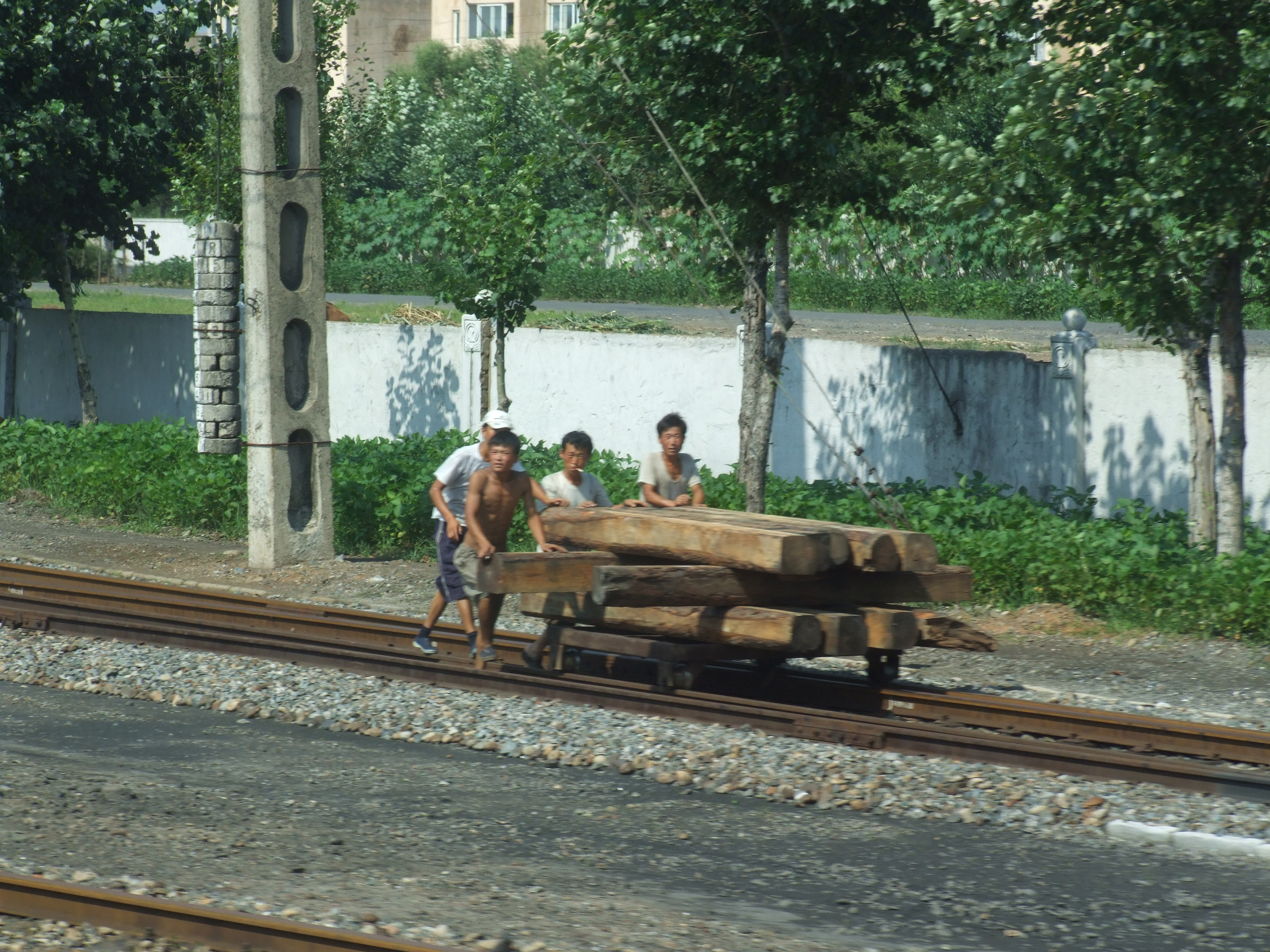 Schienentransport in Nordkorea